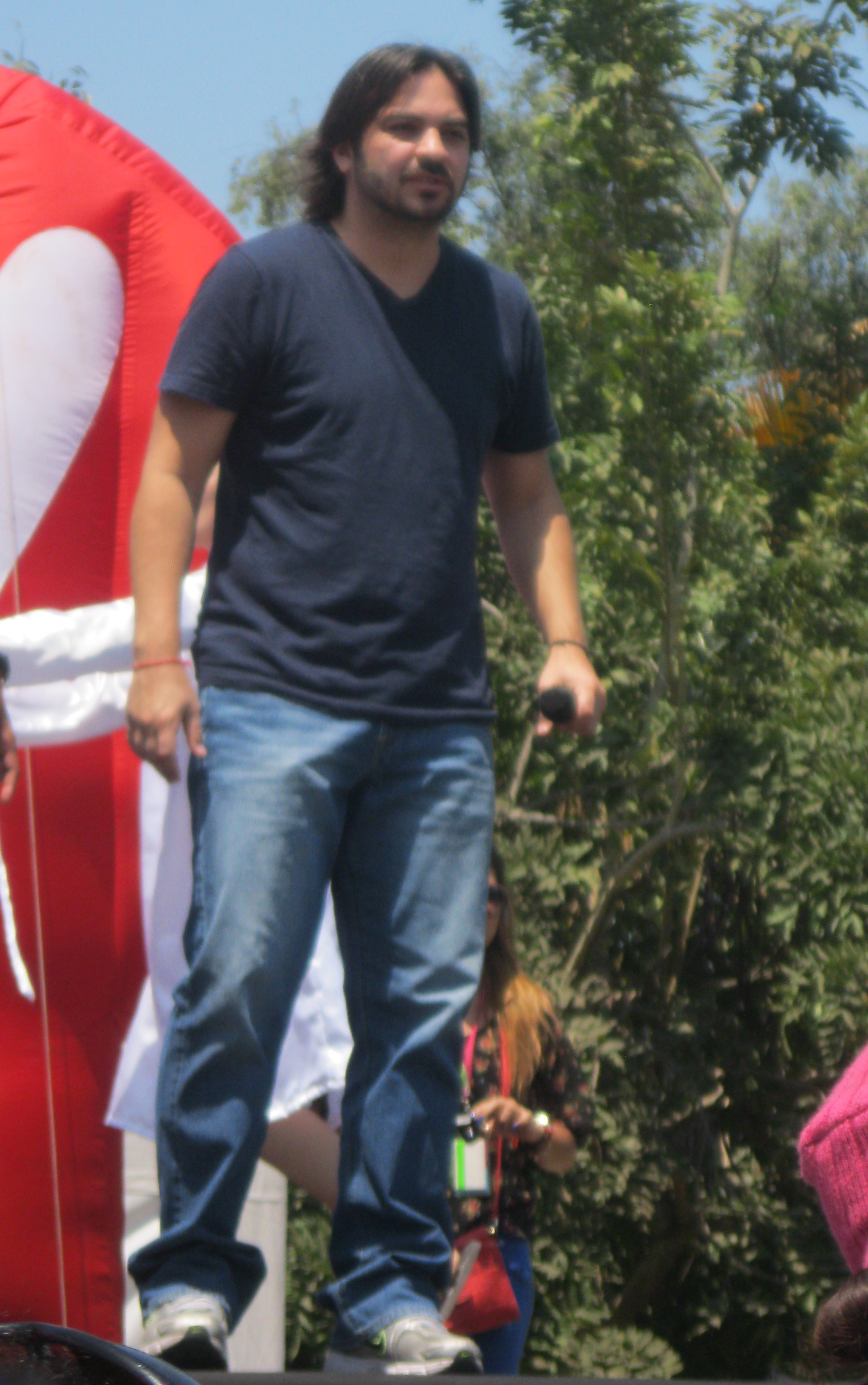 Diego Spotorno en el parque Forestal con el equipo de En Contacto, junto a María Teresa Guerrero.